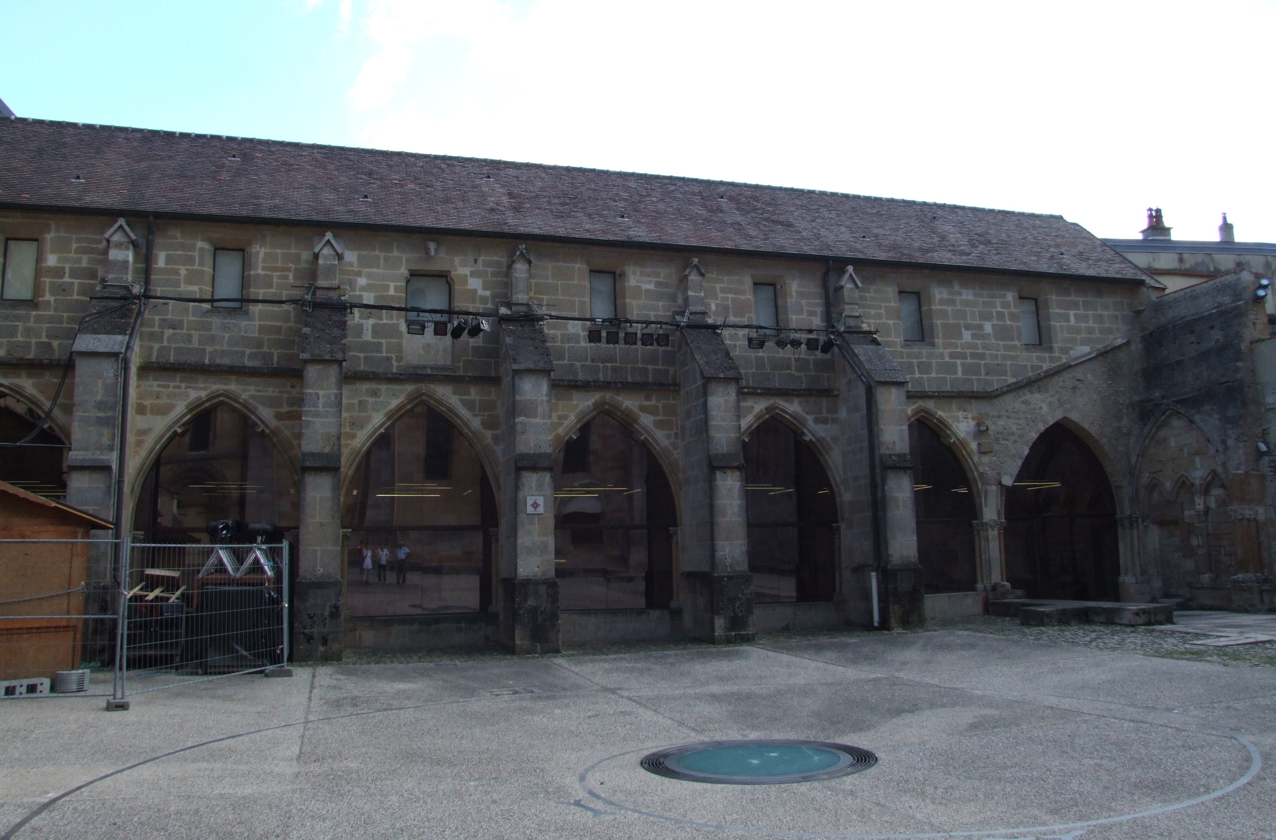 Cathédrale Saint-Mammès de Langres, FRANCE